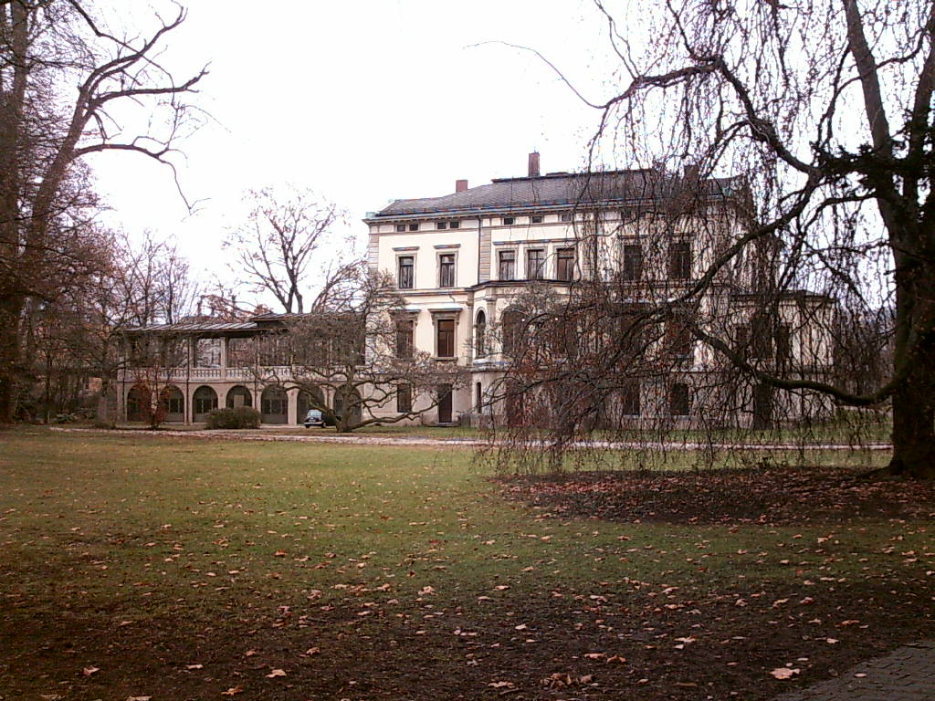 Villa Merkel in Esslingen am Neckar, wird heutzutage als Galerie der Stadt genutzt, selbst fotografiert, Januar 2006